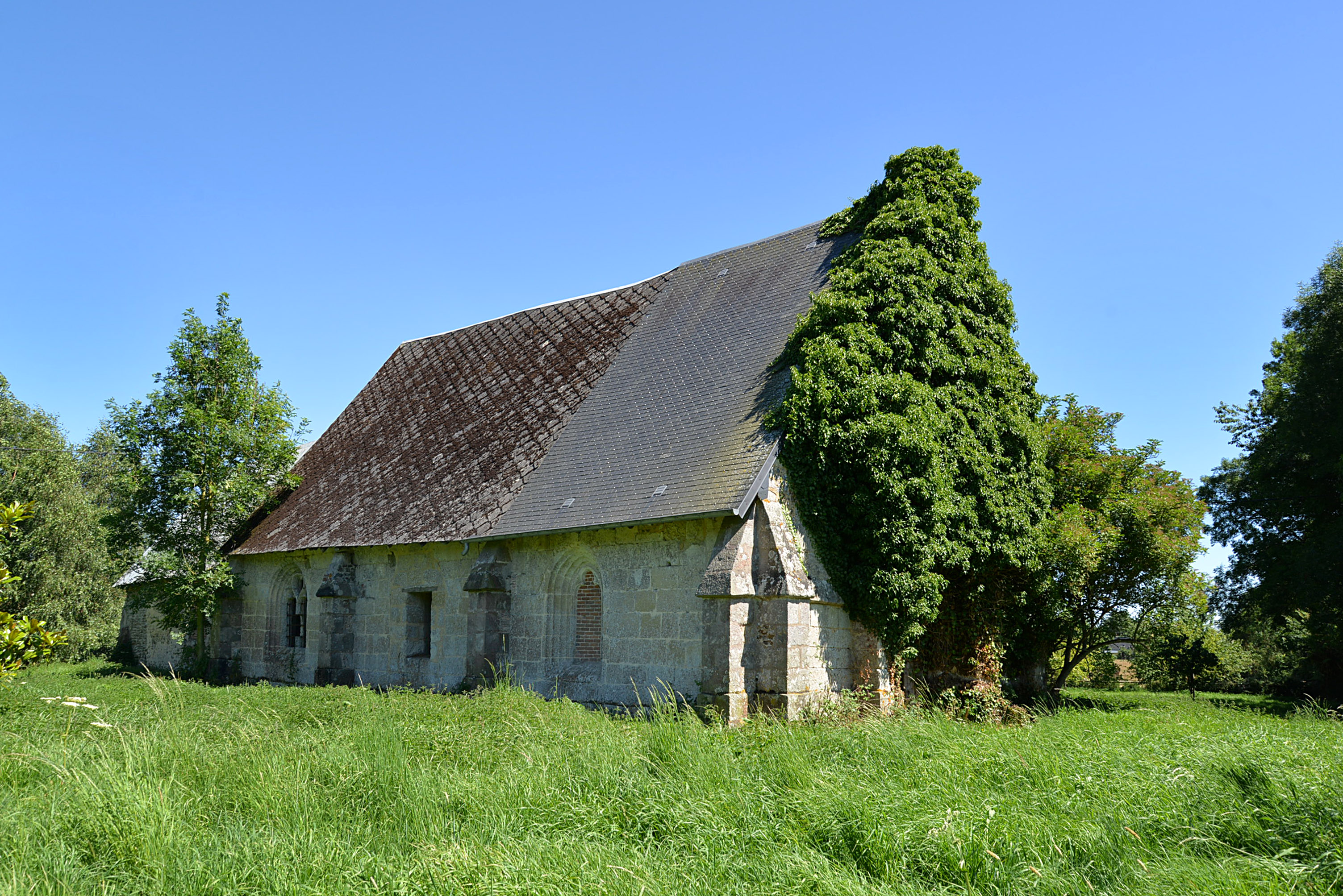 Familly (La Halboudière) (Calvados)